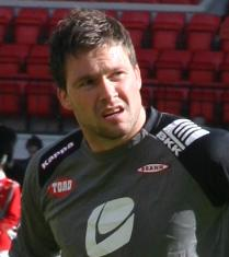 Håkon Opdal at Brann Stadion